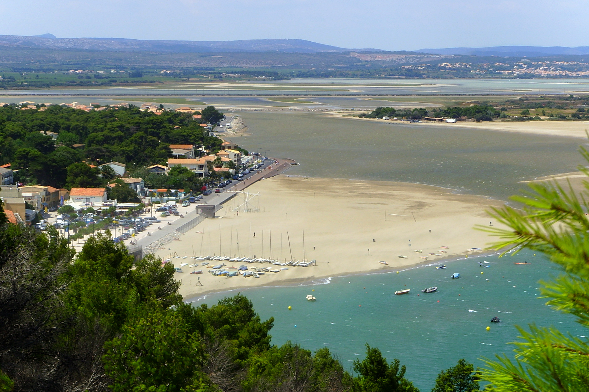 Leucate, Aude, France: La Franqui.